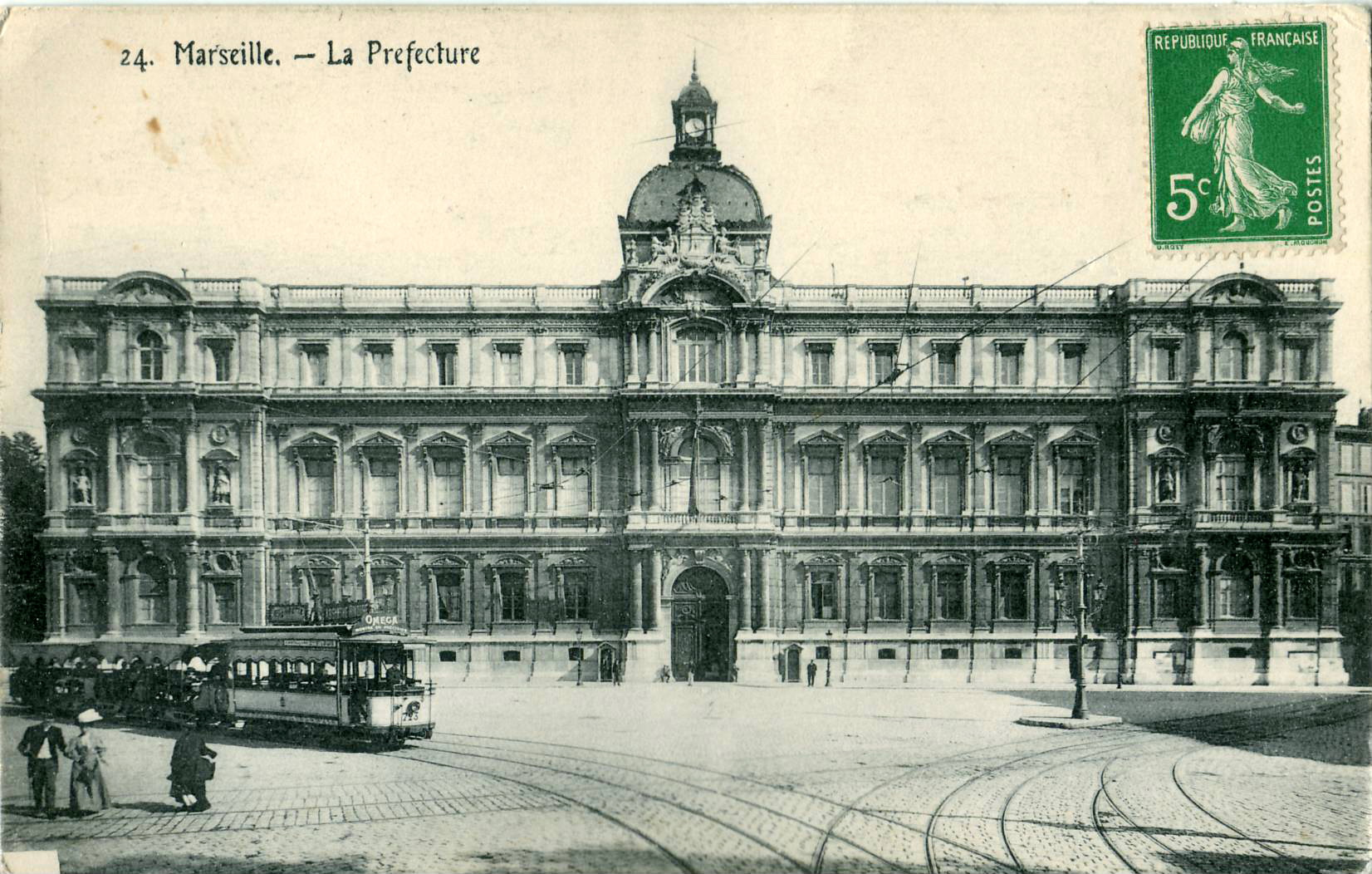 Carte postale ancienne sans mention d'éditeur, n°24 :MARSEILLE - La Préfecture